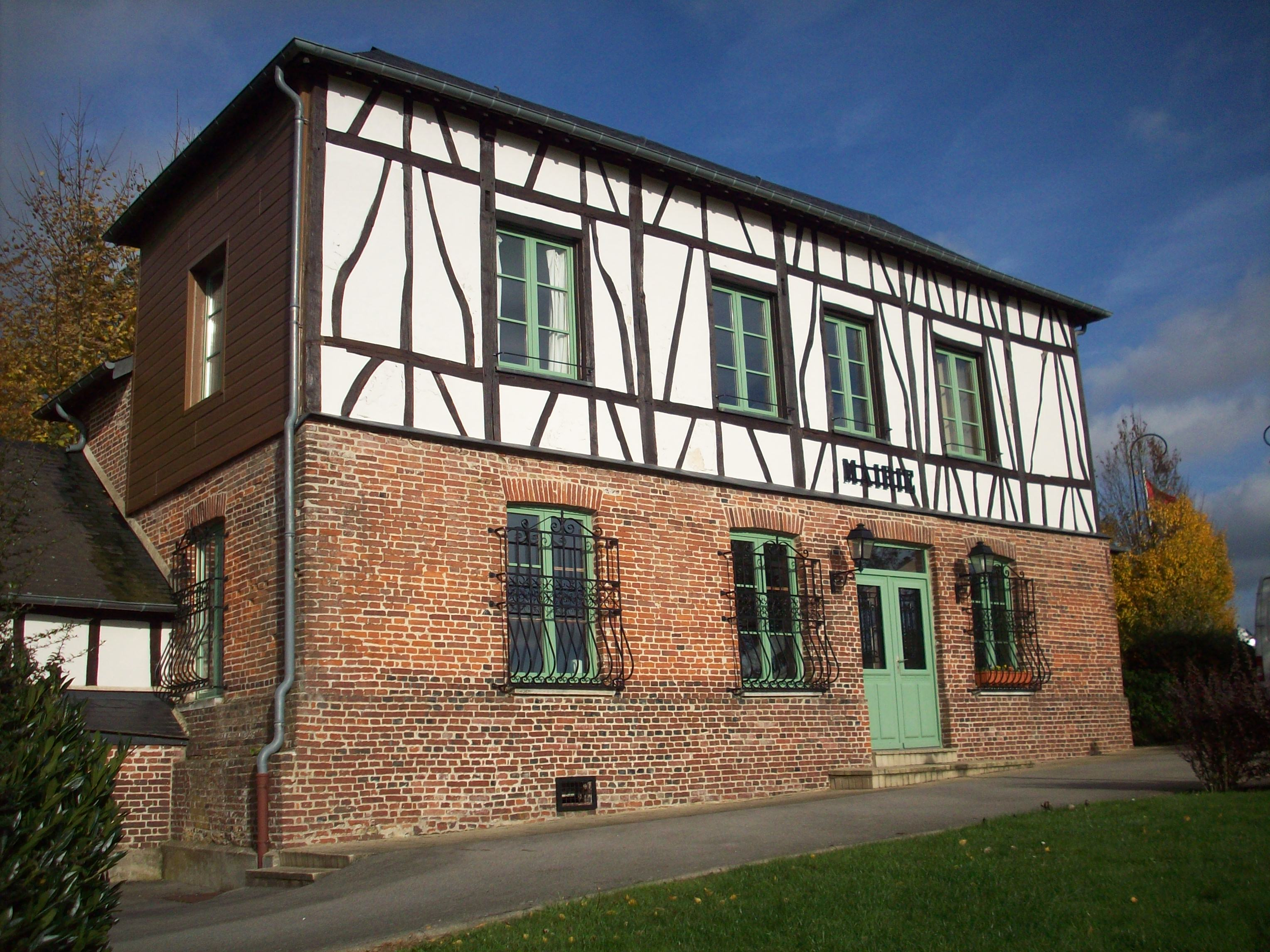 Mairie des Hogues